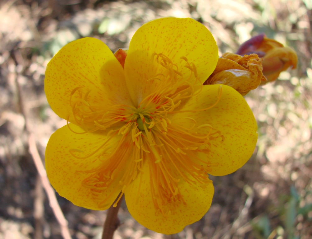 Cochlospermum regium - BIXACEAE Parque Estadual da Serra dos Pirineus - Pirenópolis - Goiás - Brasil.